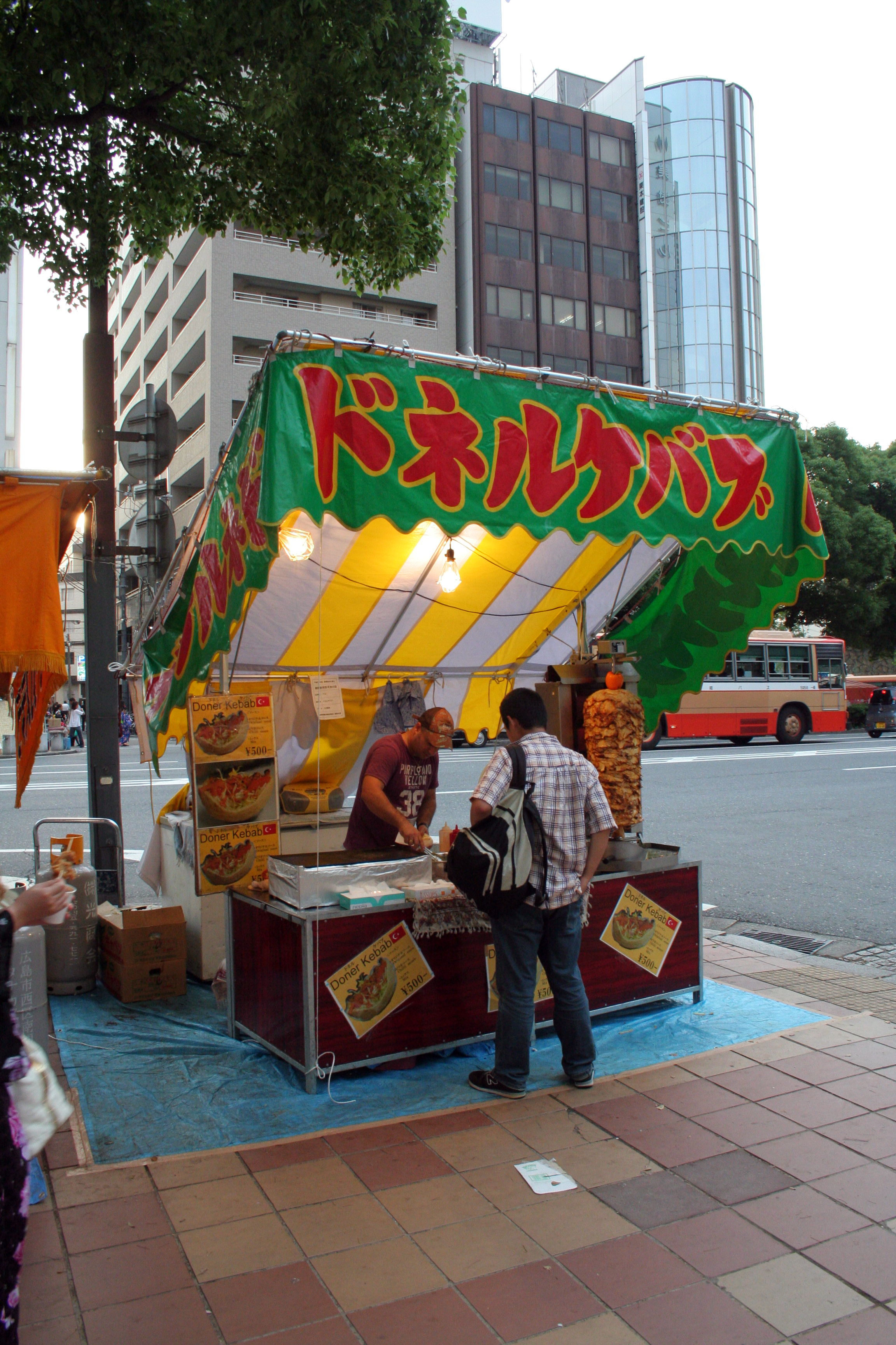 2009年6月22日から23日にかけて、姫路市大手前通りにて開催された「姫路ゆかた祭」。2つ日間にかけて行なわれた祭の風景。注意:ファイル番号及び日時は撮影時系列純にはなっておりません。また、性別、年齢、国籍などによる分類は推定で行なっております。